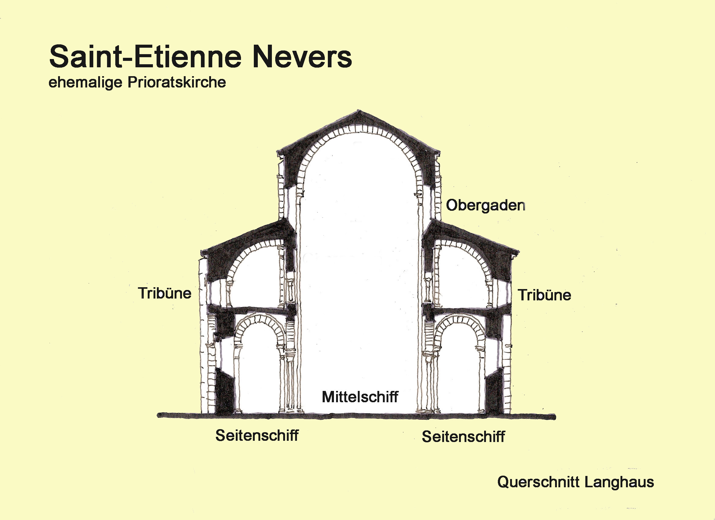 Saint-Etienne_Nevers_Querschnitt, Handskizze